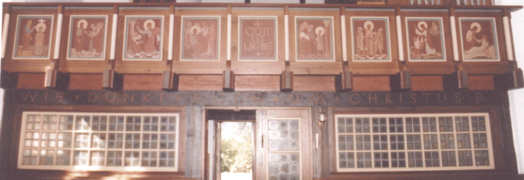 Zuerst publiziert in Uwe Gleßmer / Emmerich Jäger: Zur Entstehungsgeschichte der Gemeinde in Klein Borstel und der Kirche Maria-Magdalenen als Bau- und Kunstwerk der Architekten Hopp und Jäger mit dem Maler Hermann Junker.- Books on Demand, Norderstedt 2016 [ISBN: 978-3-739244167; eBook ISBN 978-3-741200380] S. 72